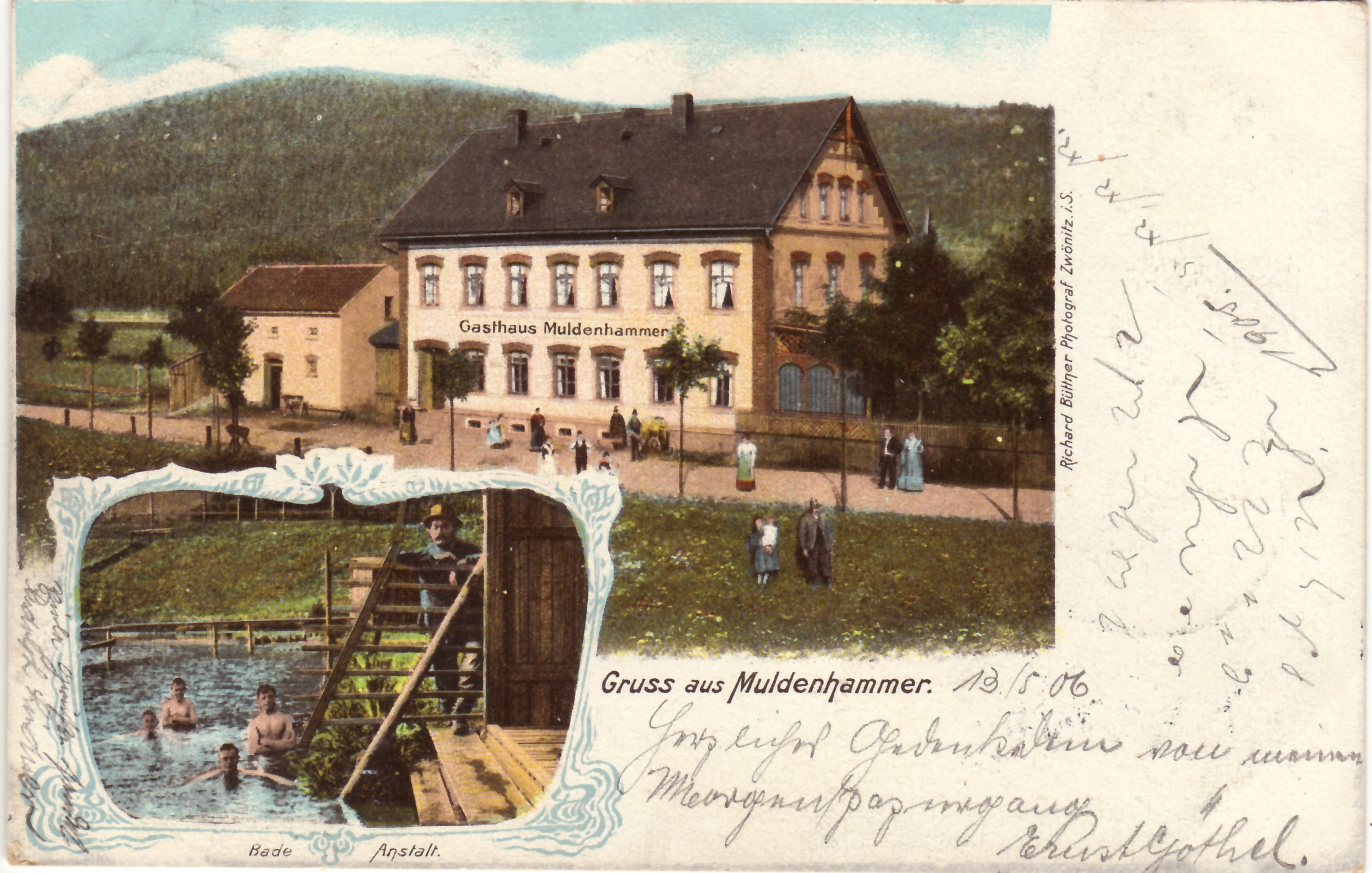 Das Gasthaus Muldenhammer (Eibenstock) und eine „Badeanstalt“ genannte Möglichkeit, im Wasser ein Bad zu nehmen. Ob dies eine von der Zwickauer Mulde abgetrennte Badestelle war? Die Ansichtskarte wurde am 13. Mai 1905 geschrieben und ging nach Eibenstock. Der Absendepoststempel von der Poststelle Wolfsgrün trägt dasselbe Datum mit der Uhrzeitangabe 12-1N (=nachmittags). Ausweislich des Empfangspoststempels des Postamts Eibenstock kam die Karte am selben Tag 5-6N (also 5 bis 6 Uhr nachmittags) an. Muldenhammer ist in der in den 1980er Jahren entstandenen Talsperre Eibenstock versunken.